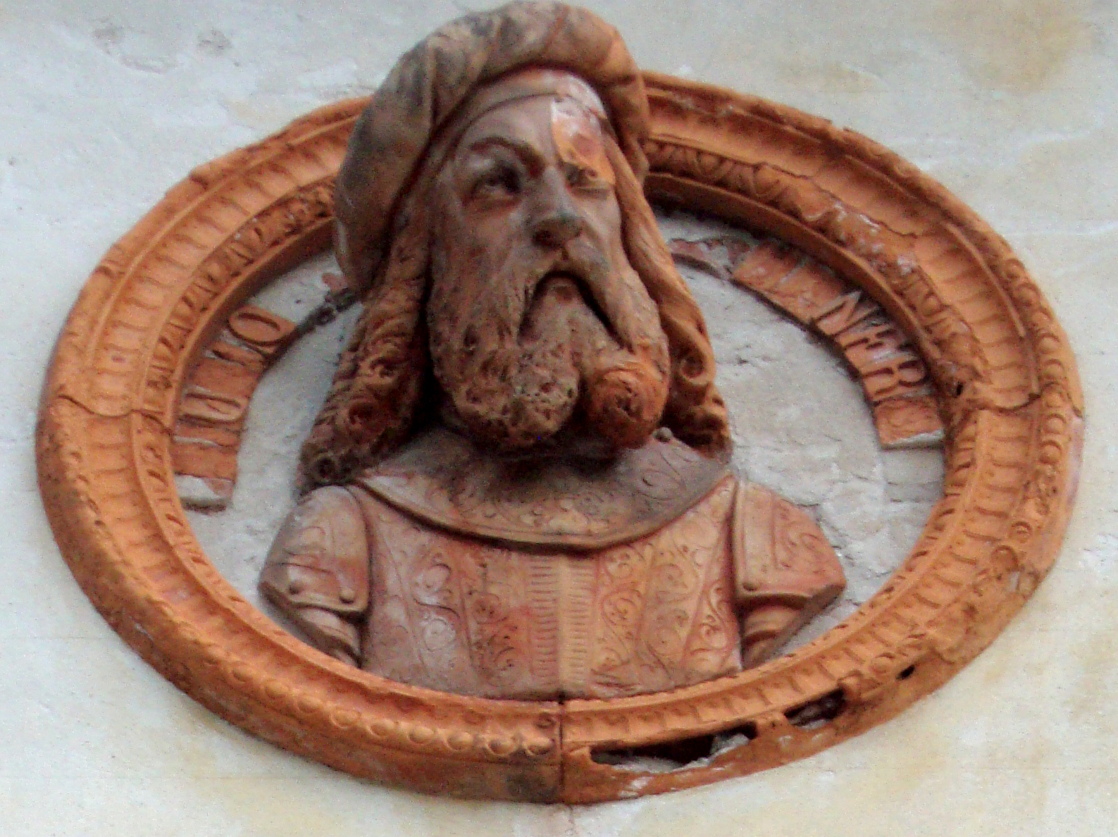 Schio, particolare della facciata del Teatro Jacquard This is a photo of a monument which is part of cultural heritage of Italy.